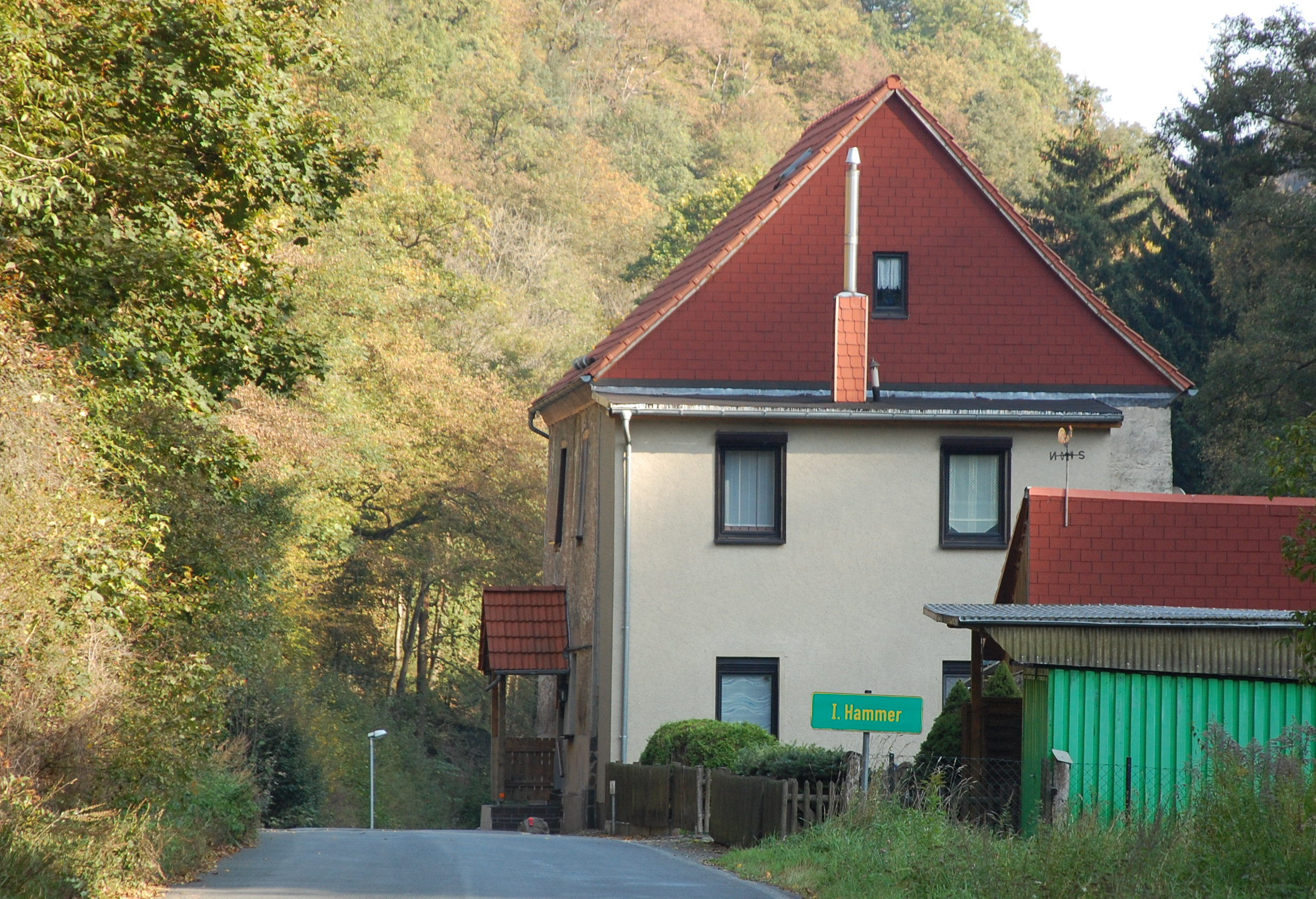 I. Hammer